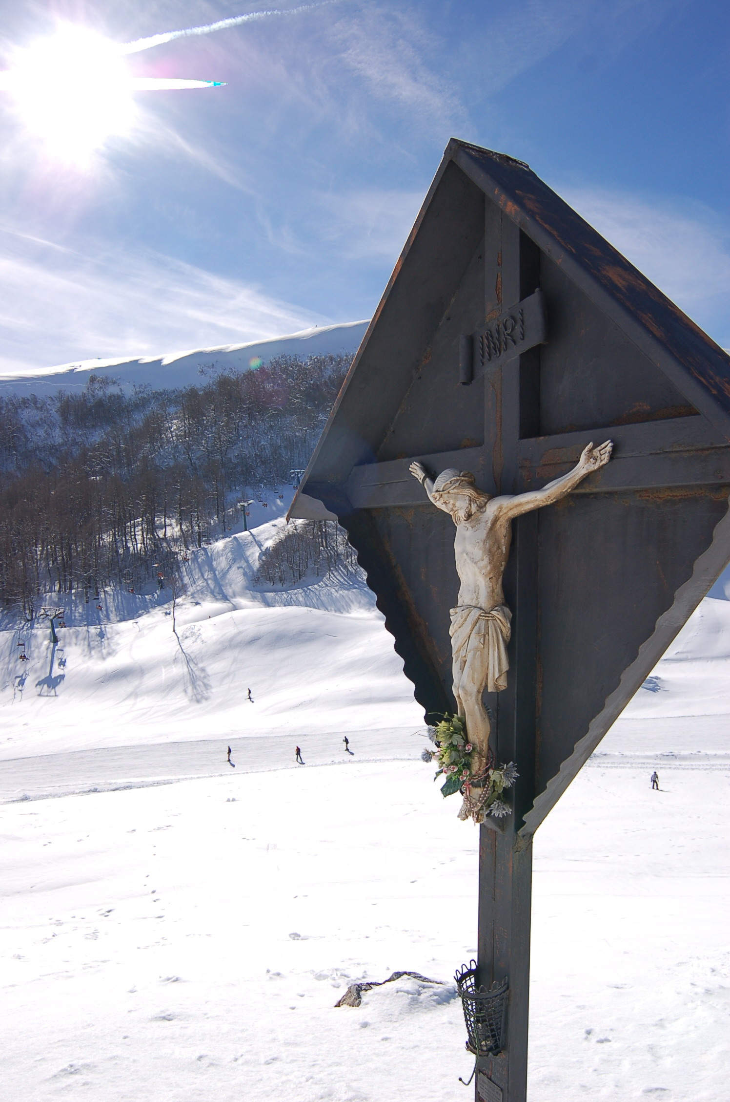 Cristo del campo Staffi (pista de esquí) en Italia